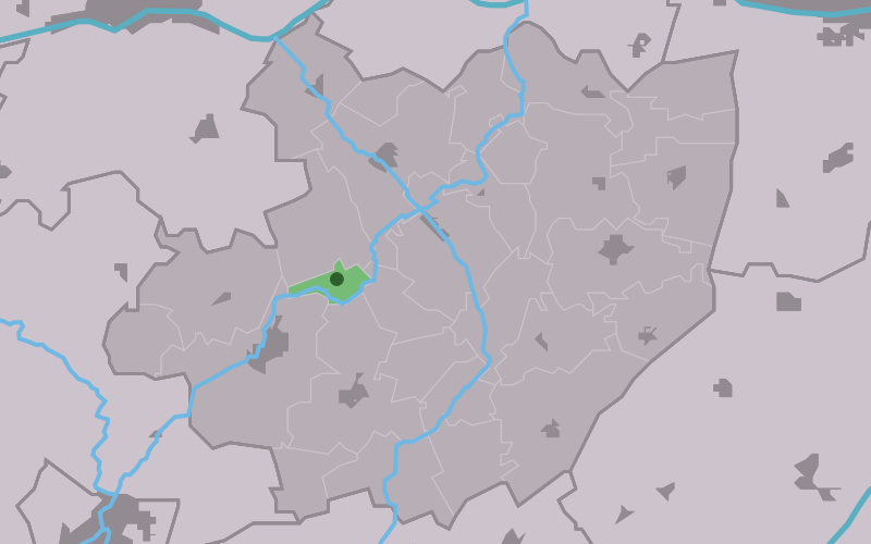 Kaartsje fan himrik fan Iens